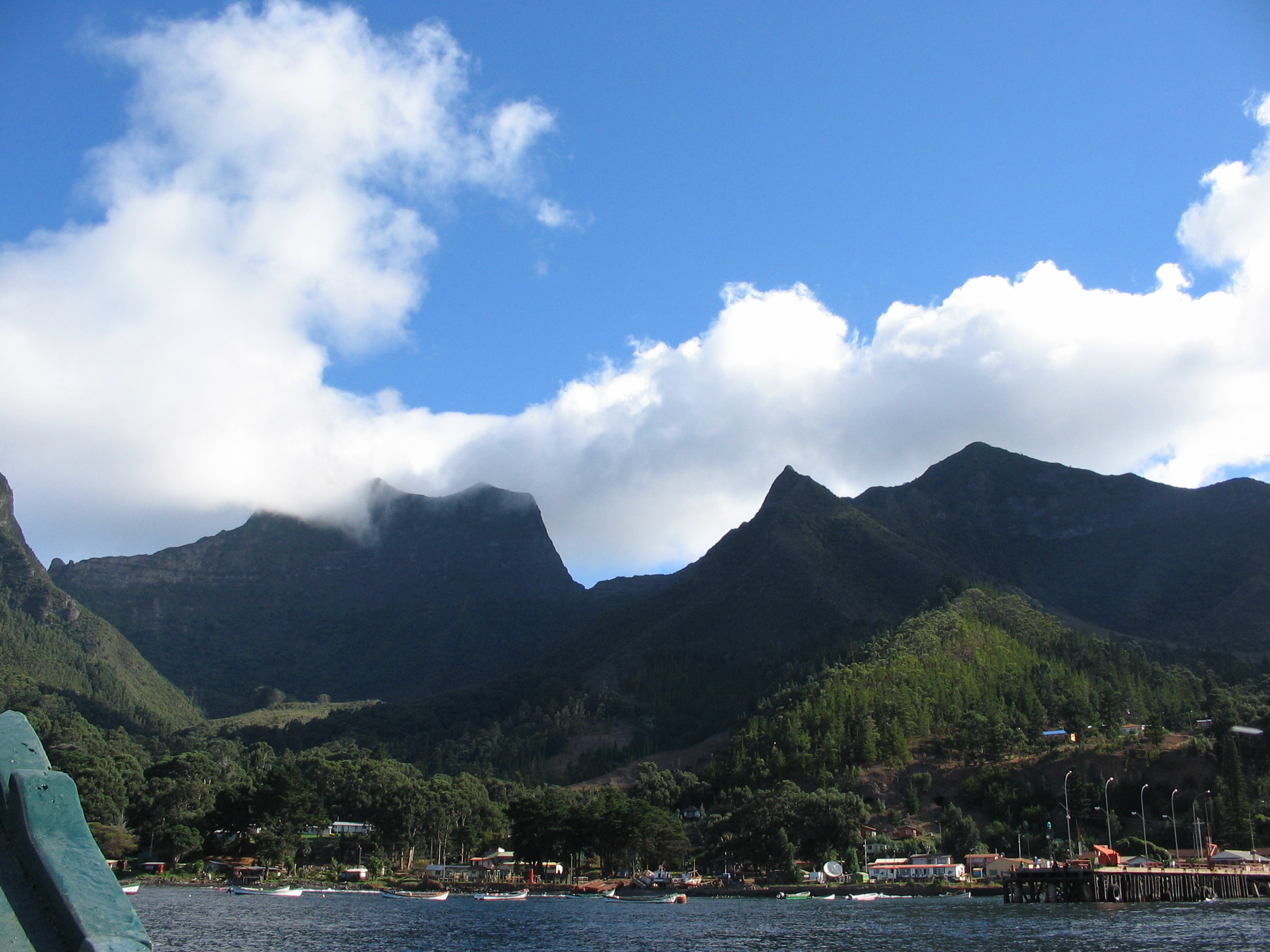 Isla Robinson Crusoe Chile, Archpielago Juan Fernandez, Vista desde un Bote hacia Robinson Crusoe. Chile, Juan Fernandez, view from a boat to Robinson Crusoe. Autor: Serpentus